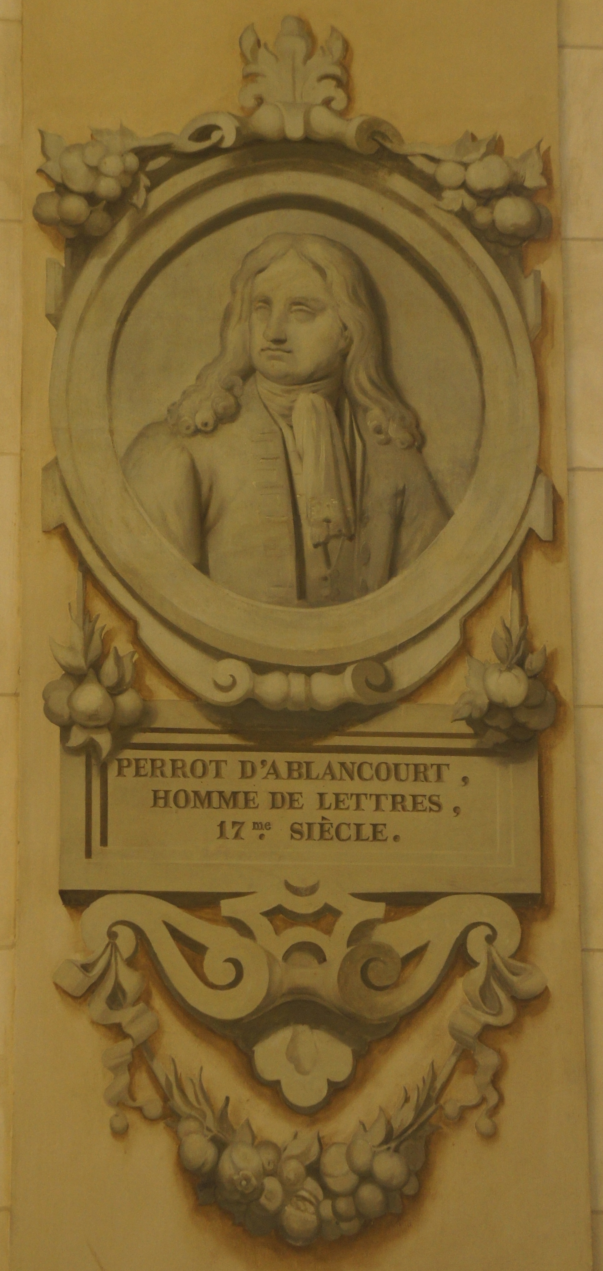 grisaille se trouvant à la mairie de Châlons et présentant Perrot d'Ablancourt.